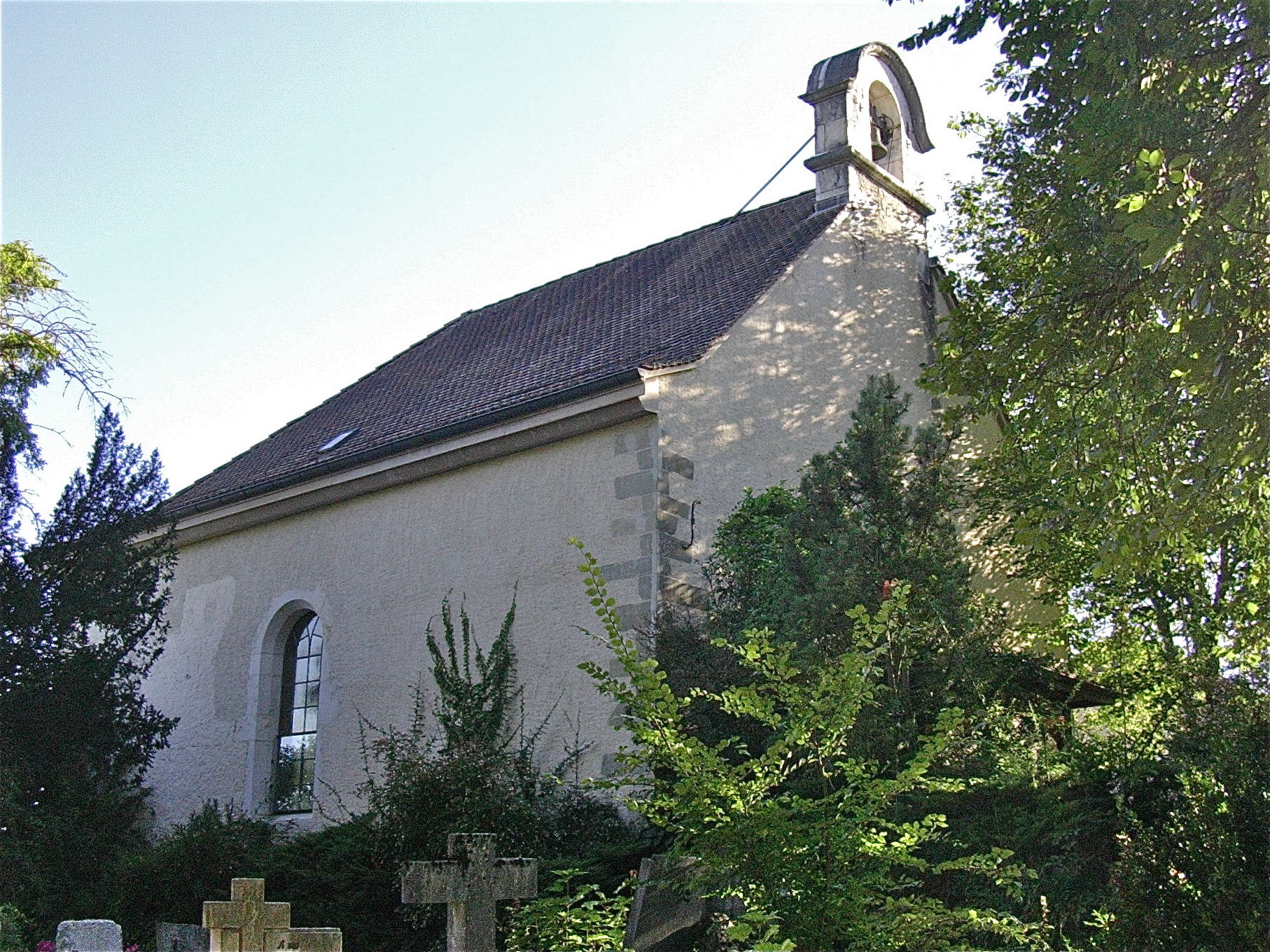 La Chapelle Réformée de Peney-dessus